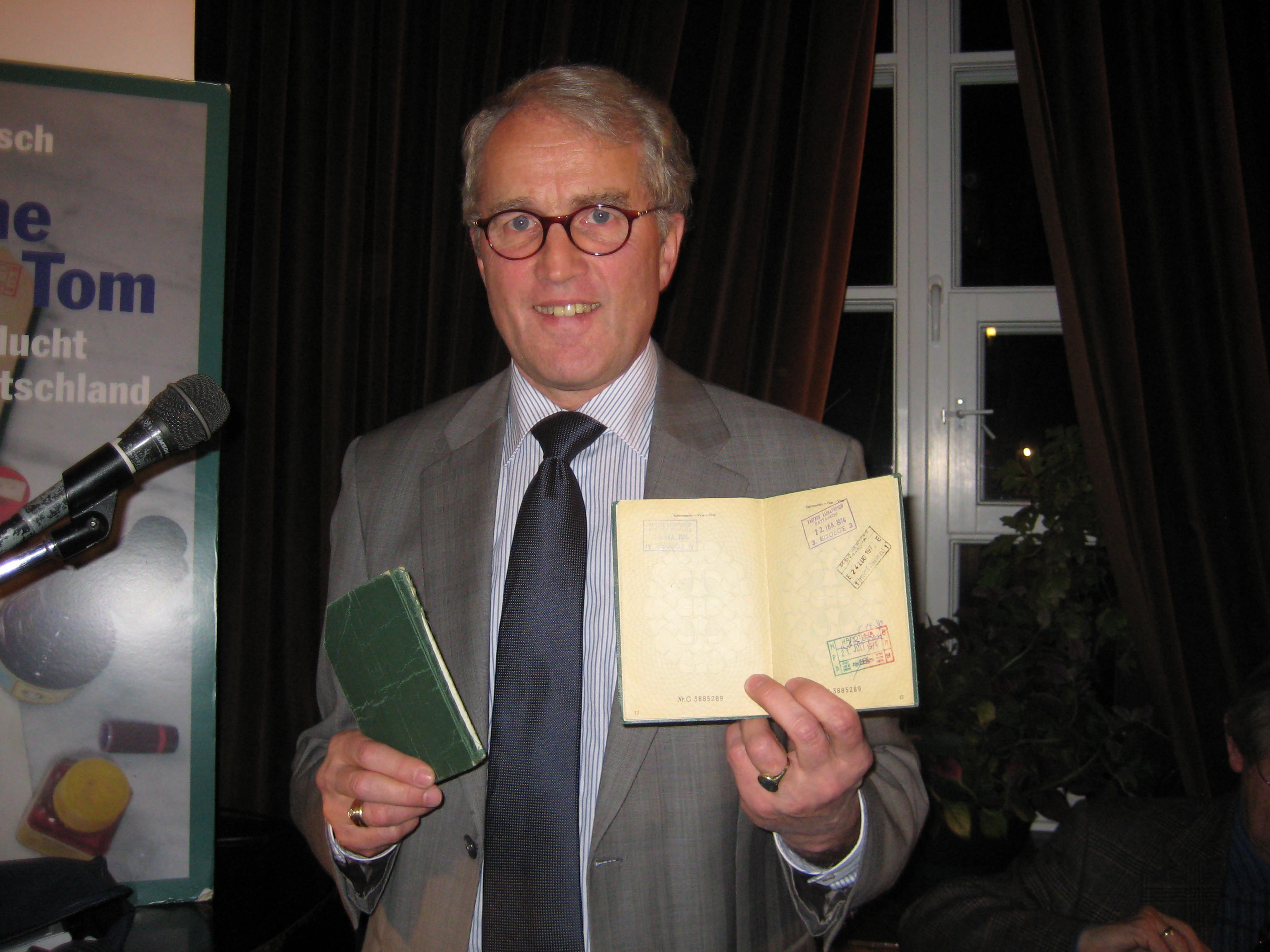 Ruediger von Fritsch hält einen der von ihm gefälschten Reisepässe (ausgetauschtes Foto, nachgemachter Stempel), mit dem er und sein Bruder Burkhard 1974 einem Vetter und anderen DDR-Bürgern die Flucht in die BRD ermöglichten. Das Foto wurde auf einer Präsentation des ins Polnische übersetzten Buches "Die Sache mit Tom" (Stempel do wolności. Ucieczka z Niemiec do Niemiec) in Warschau geschossen.